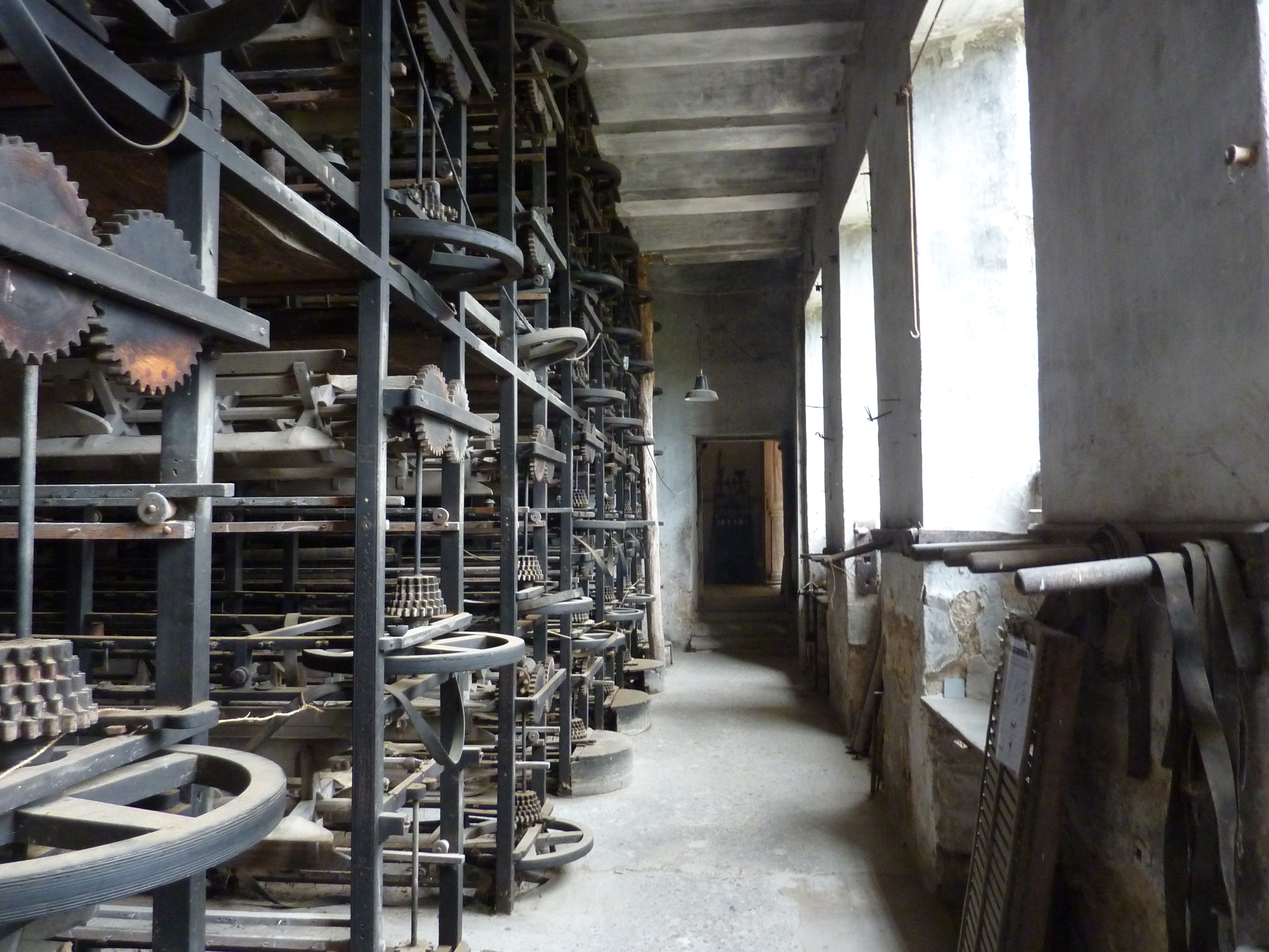 Machines, usine de moulinage de soie de la Galicière, Chatte, Isère, France. .